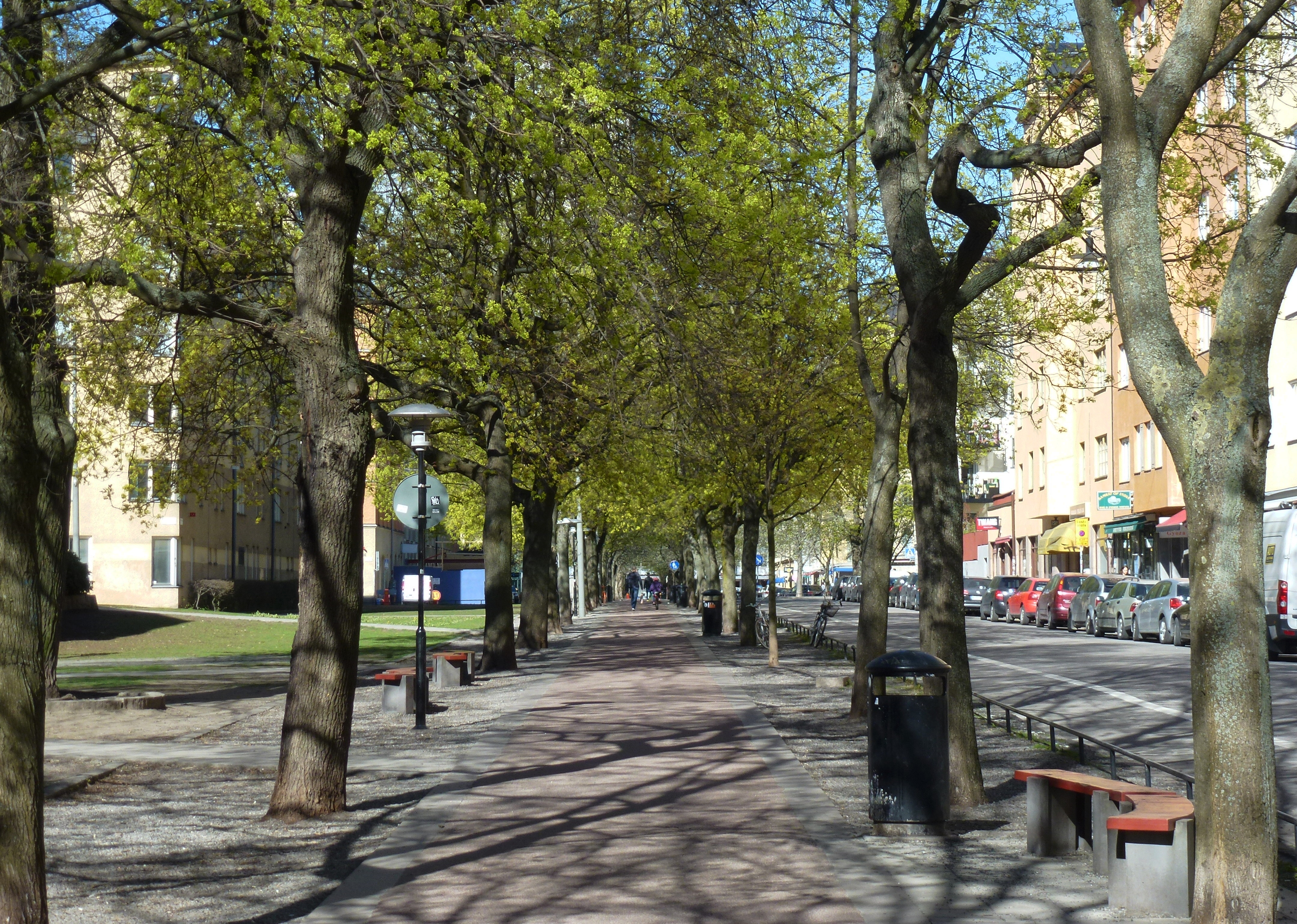 Katarina Bangata norrut